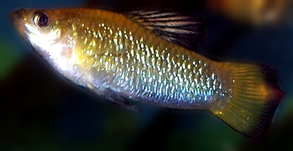 Limia perugiae, Männchen